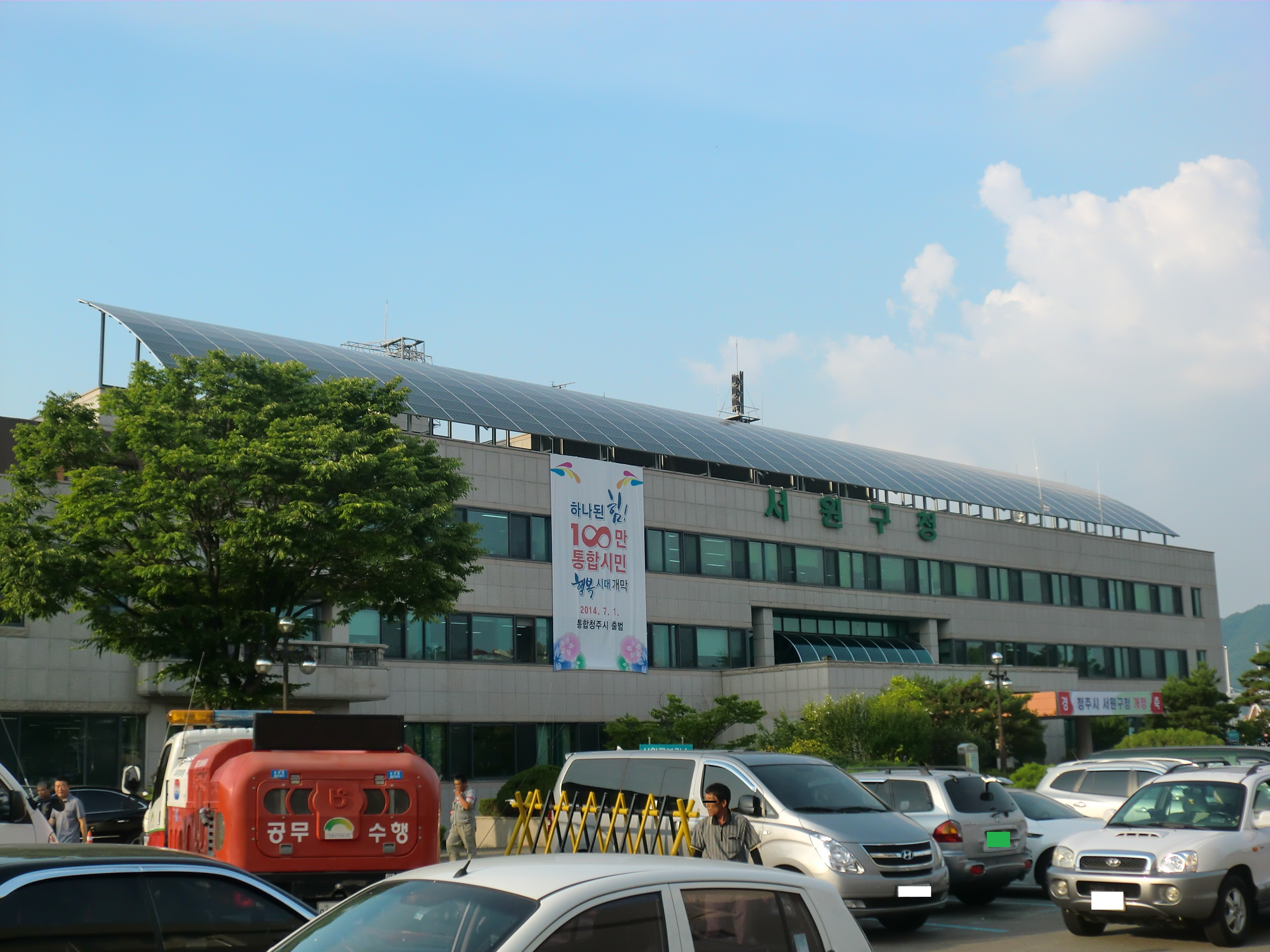 충청북도 청주시 서원구에 있는 서원구청